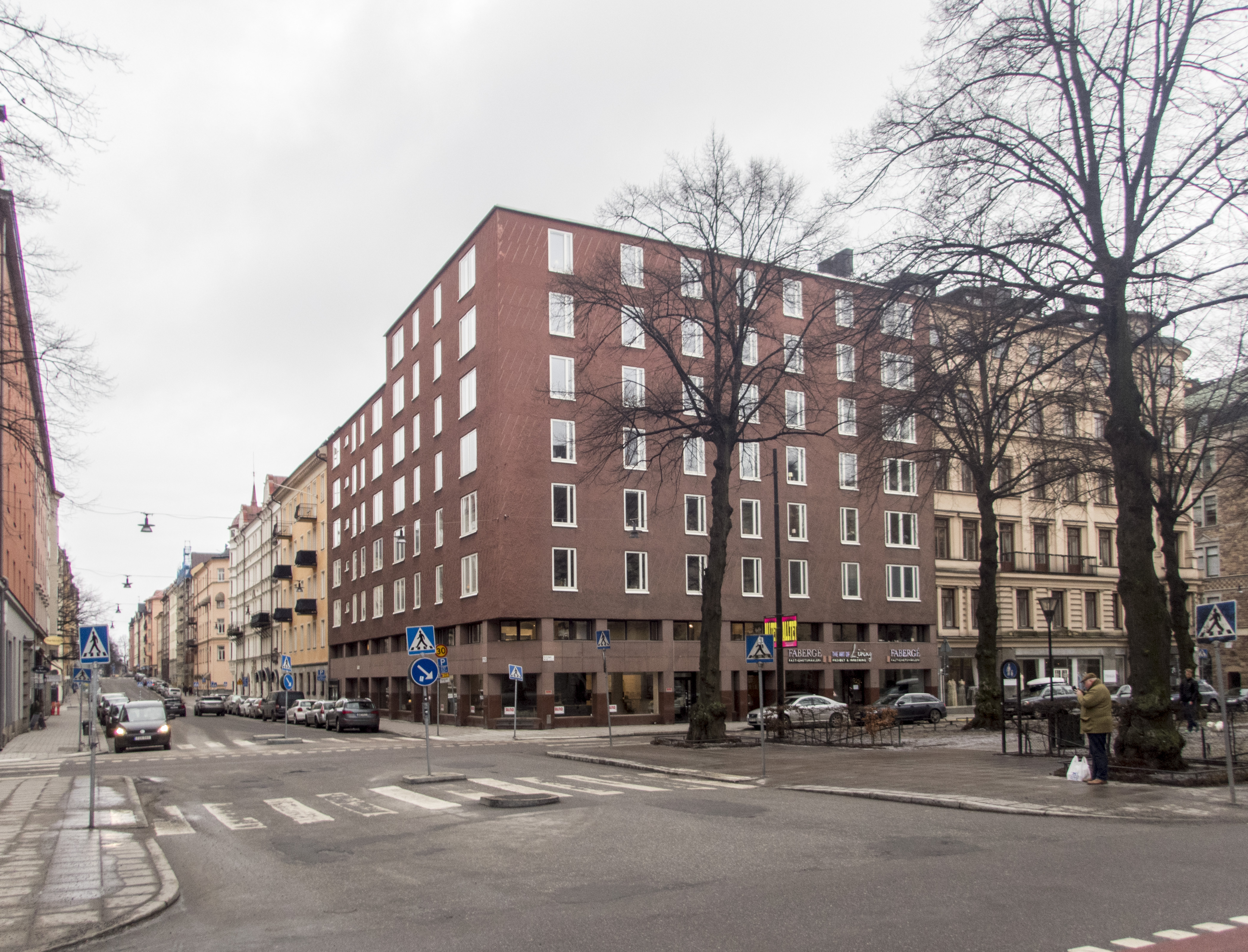 Brännaren 8, Artillerigatan 55, Karlavägen 64 Stockholm, Nybyggnadsår 1966 - 1968 Axel Kandell (Arkitekt) John Mattson (Byggmästare) John Mattson (Byggherre)